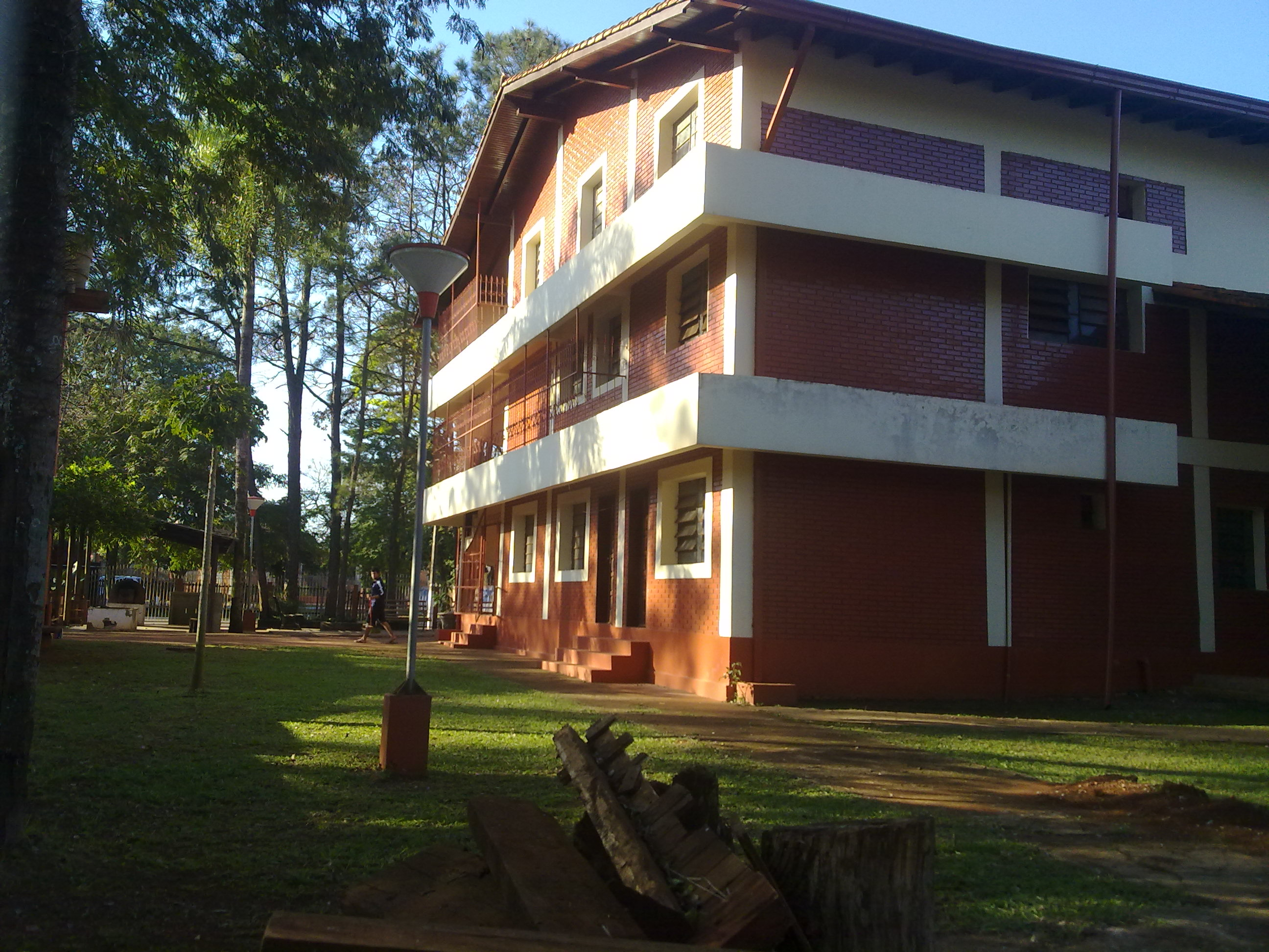 Casa Pastoral de Hernandarias